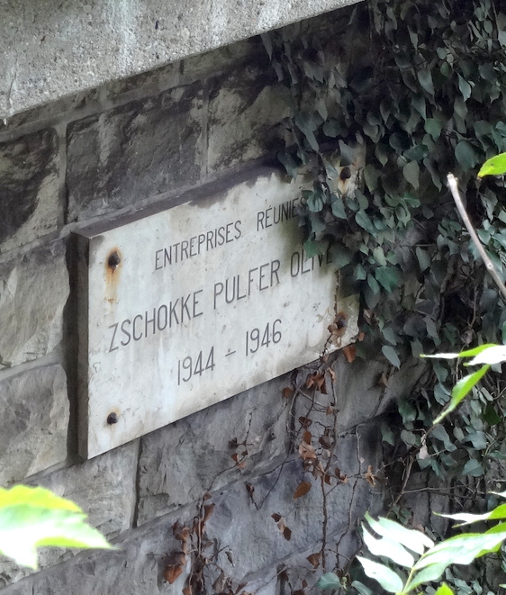 Plaque sur le viaduc de la Jonction à Genève, côté du Bois de la Bâtie.